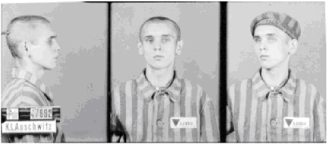 Made in KL Auschwitz